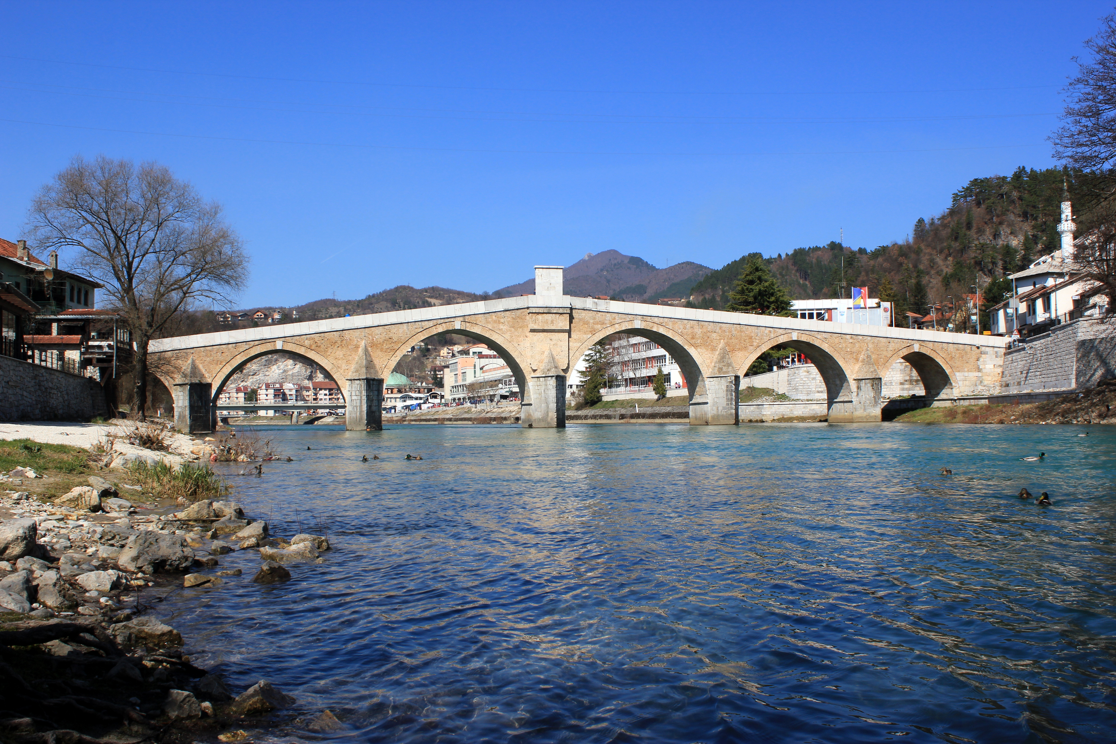 Die 2008 wieder aufgebaute osmanische Brücke über die Neretva in Konjic, Bosnien und Herzegowina.